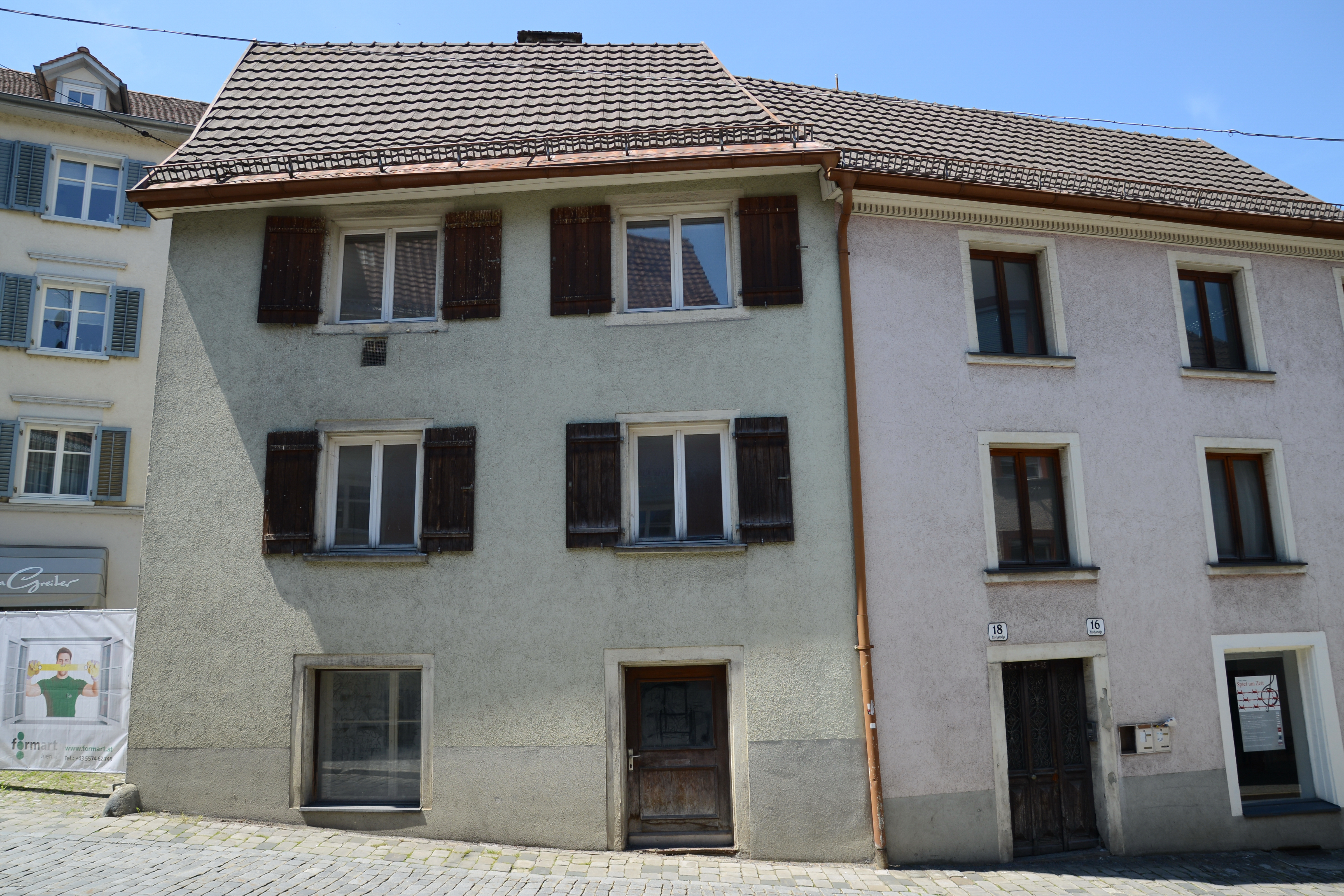 Bregenz, Kirch Straße 18